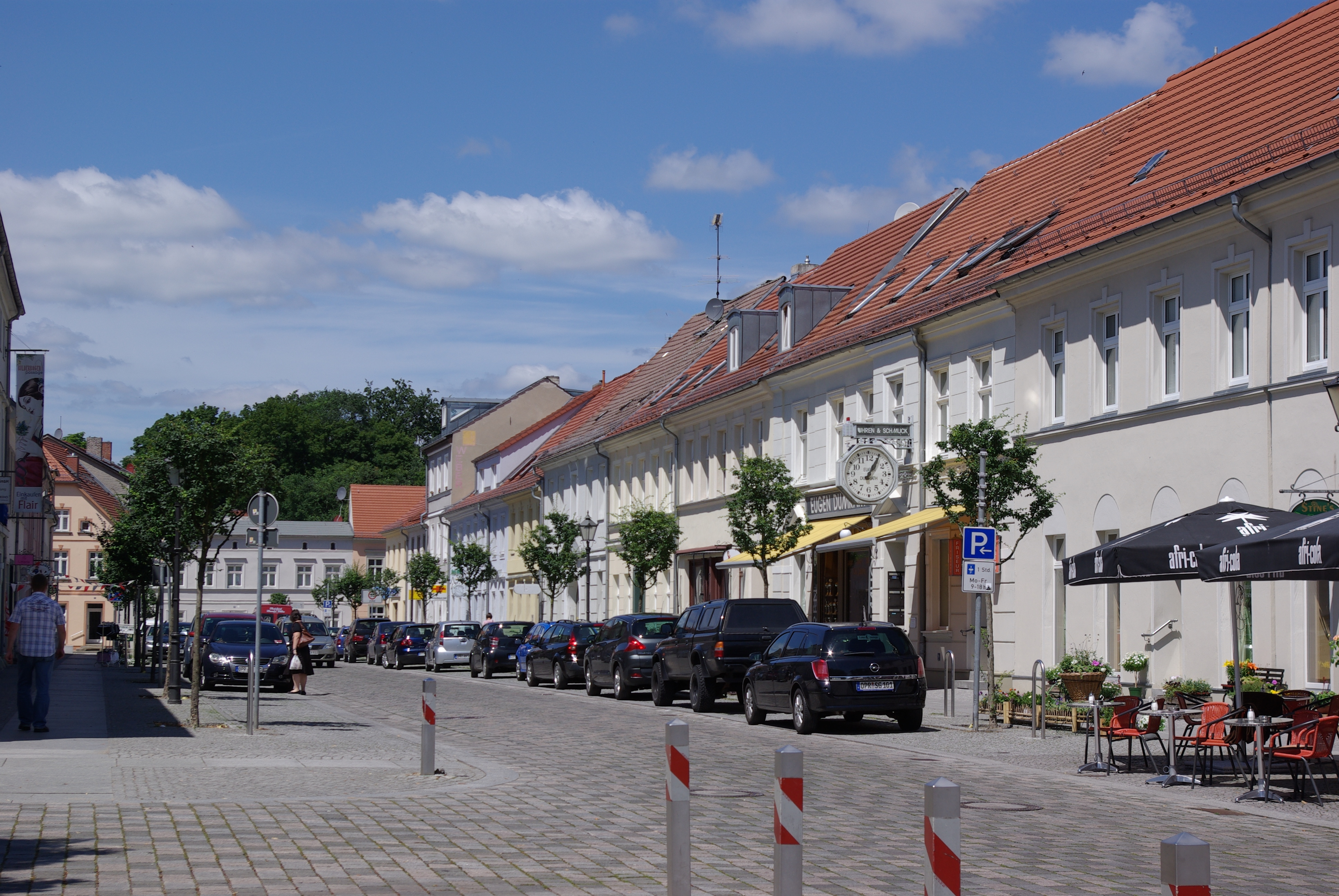 Neuruppin in Brandeburg. Zu sehen ist die Friedrich-Ebert-Straße in Neurupin von der Karl-marx-Straße aus.